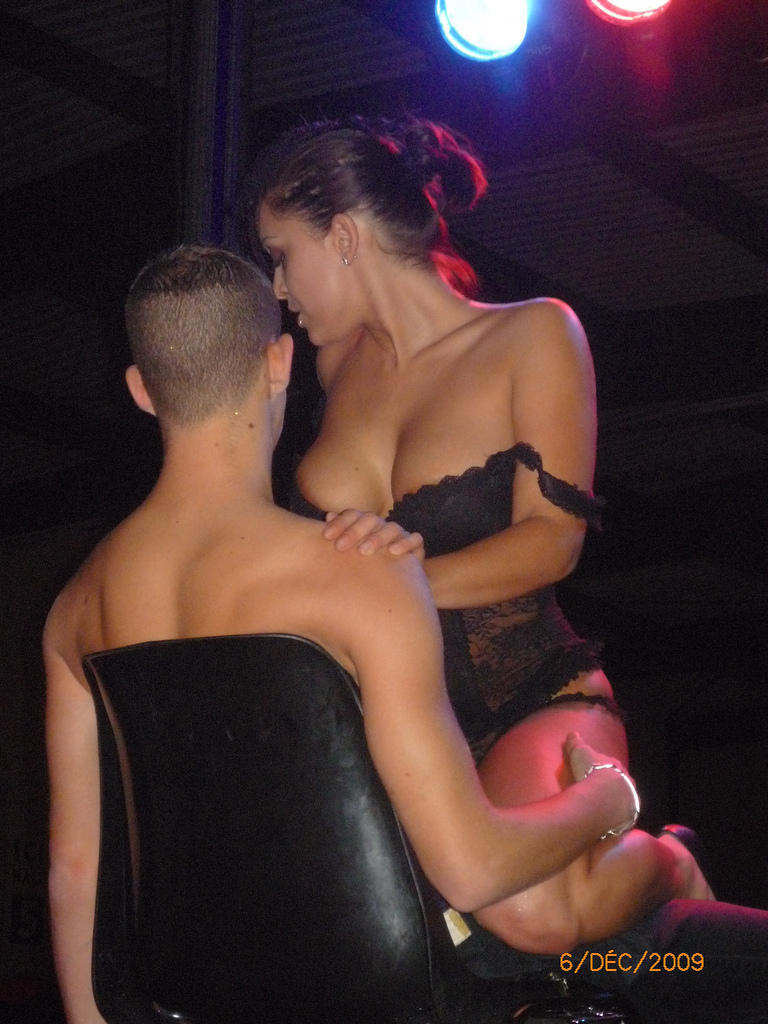 Eropolis - 43